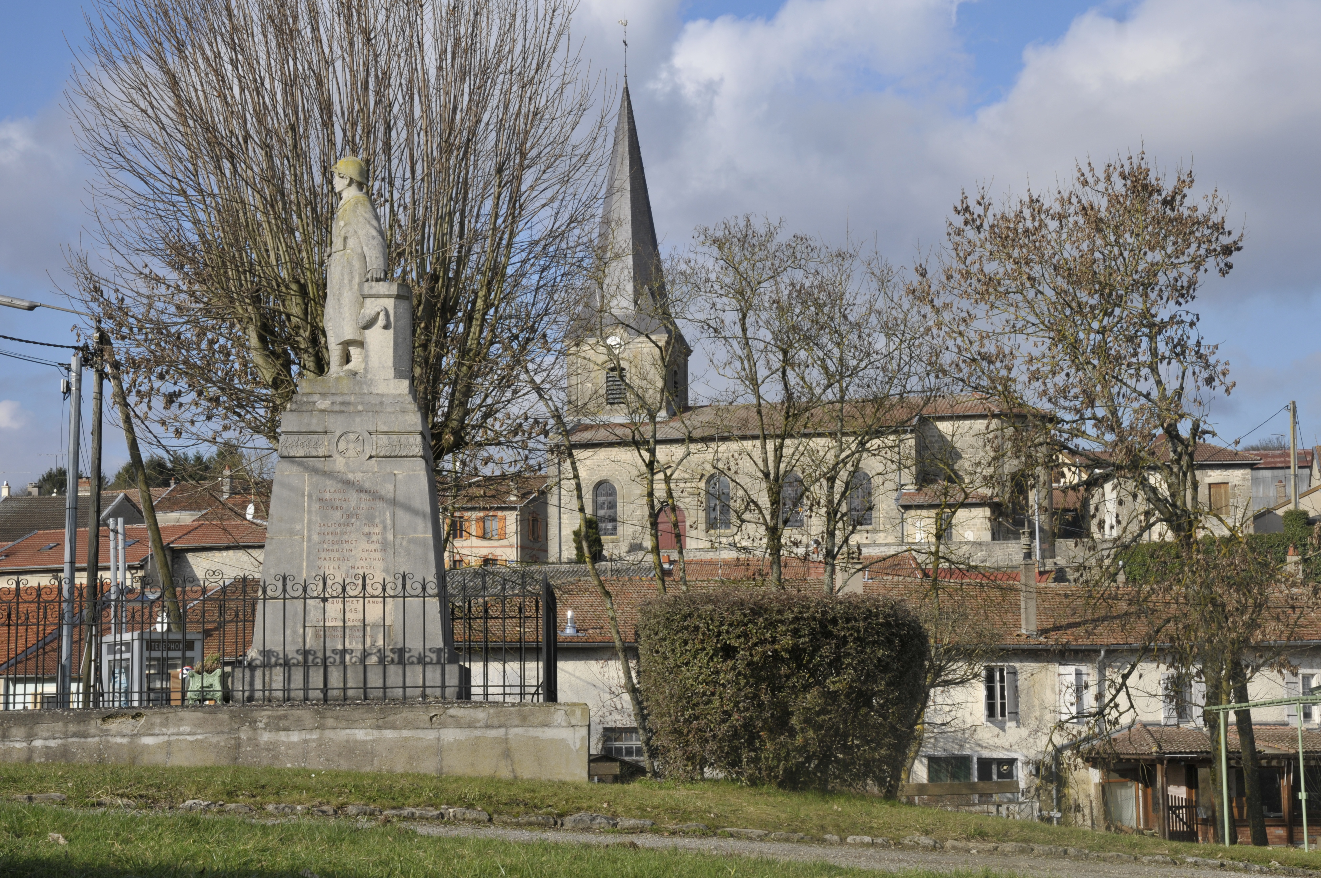 Monument aux morts et église à Vilosnes-Haraumont